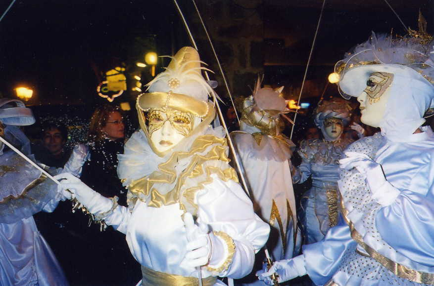 Las Fennos - Carnaval de Limoux